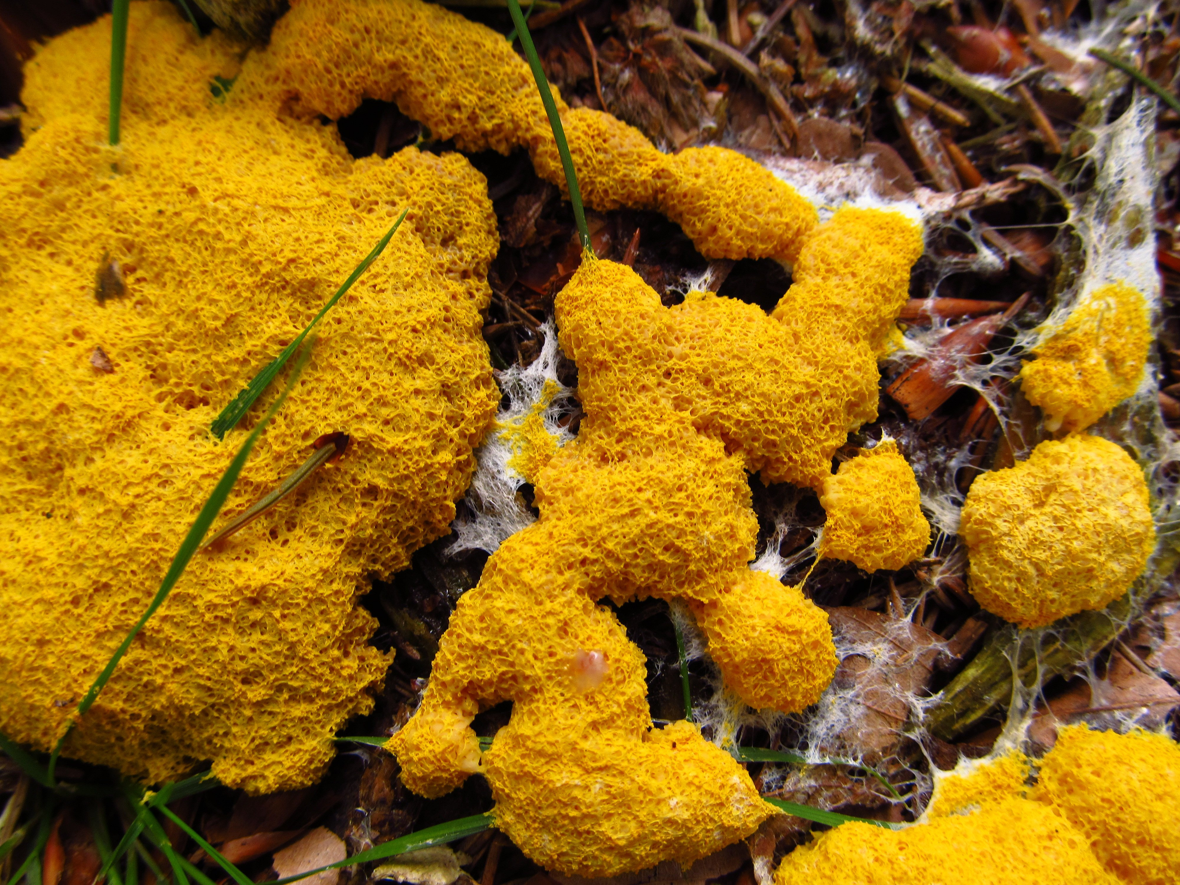 Gelbe Lohblüte (Hexenbutter)-Fuligo septica, Klasse: Schleimpilze (Myxomycetes), Photo: 05.09.2011, Hochwald bei Xanten-Marienbaum/ Kreis Wesel/ Niederrhein.